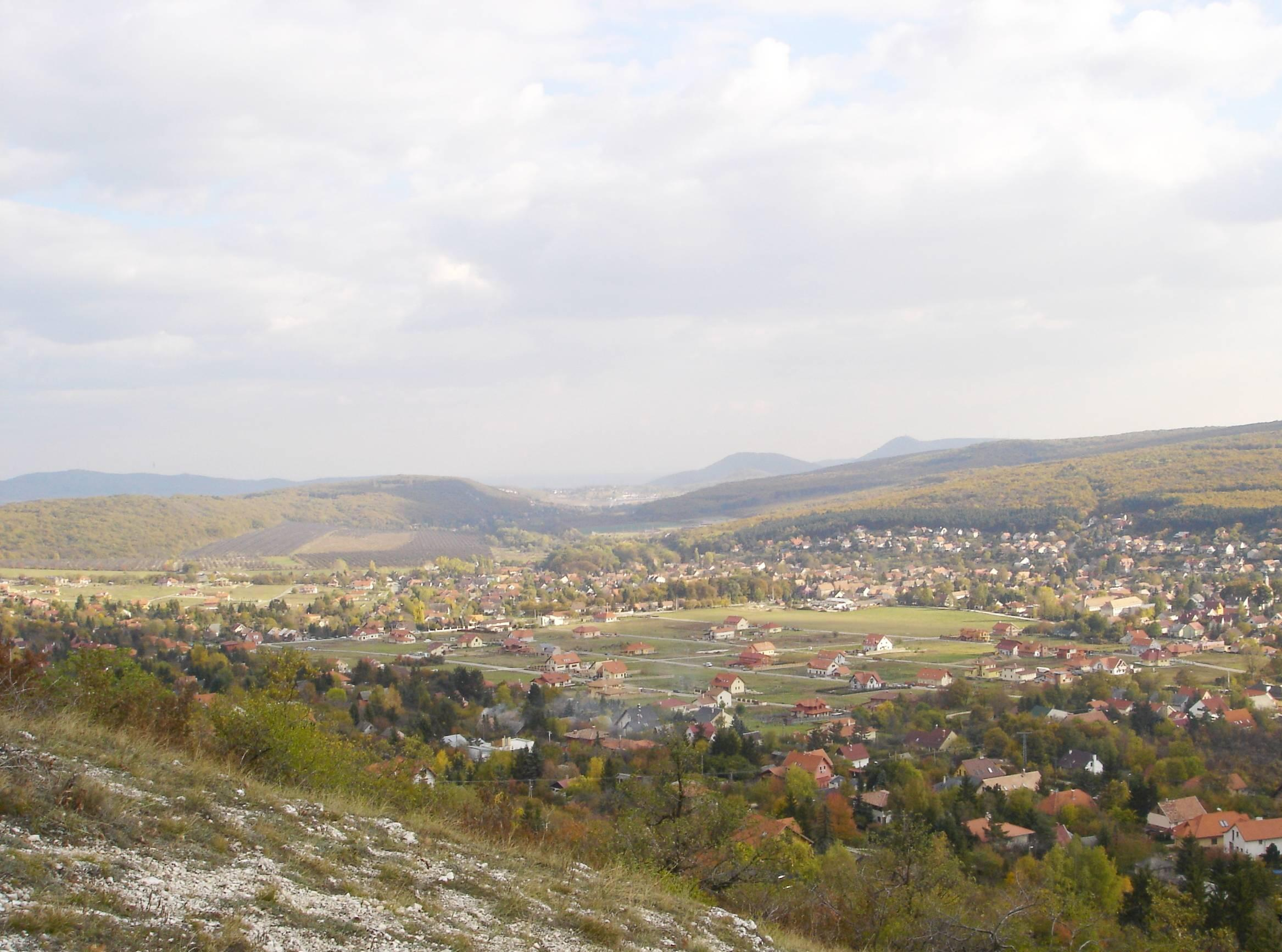 Nagykovácsi from a nearby hill